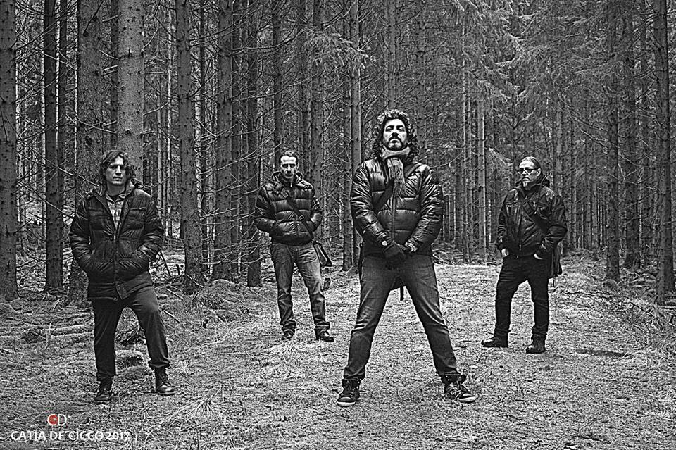 Offizielles Bandfoto